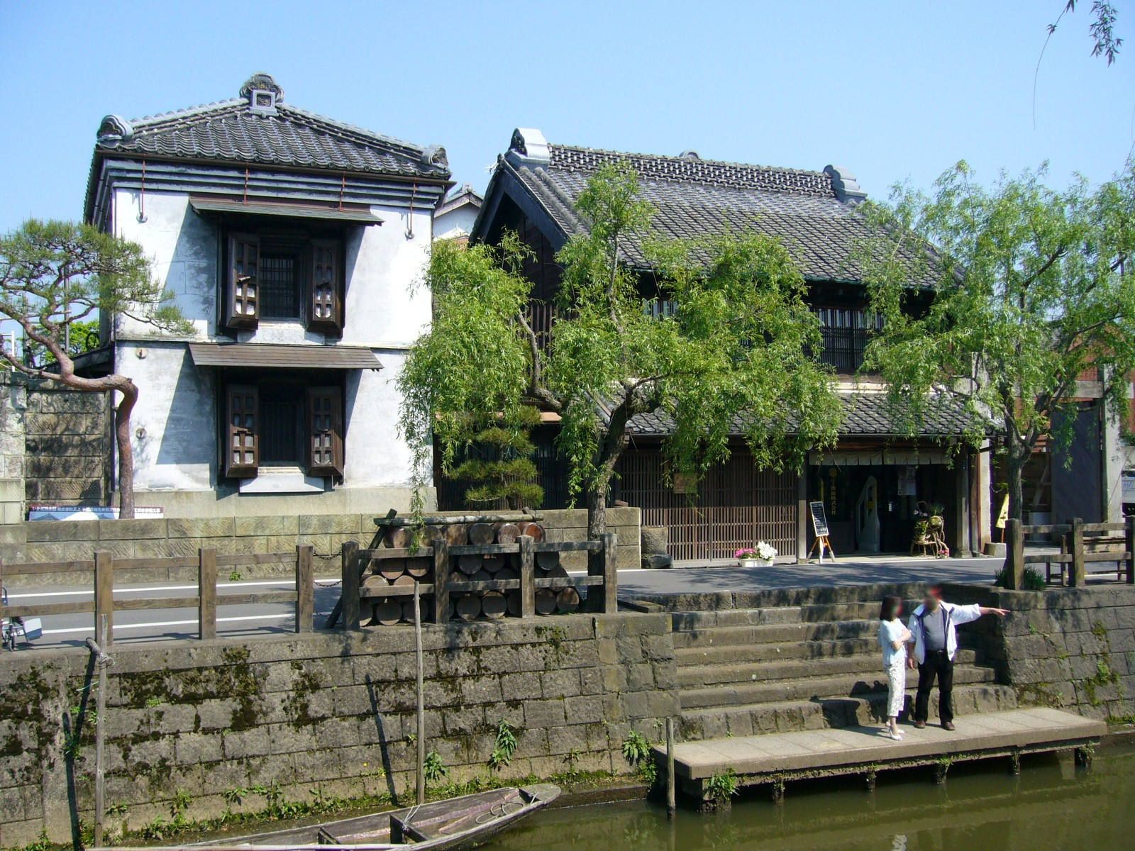 syojyo&onogawa-river&dashi,sawara,katori-city,japan